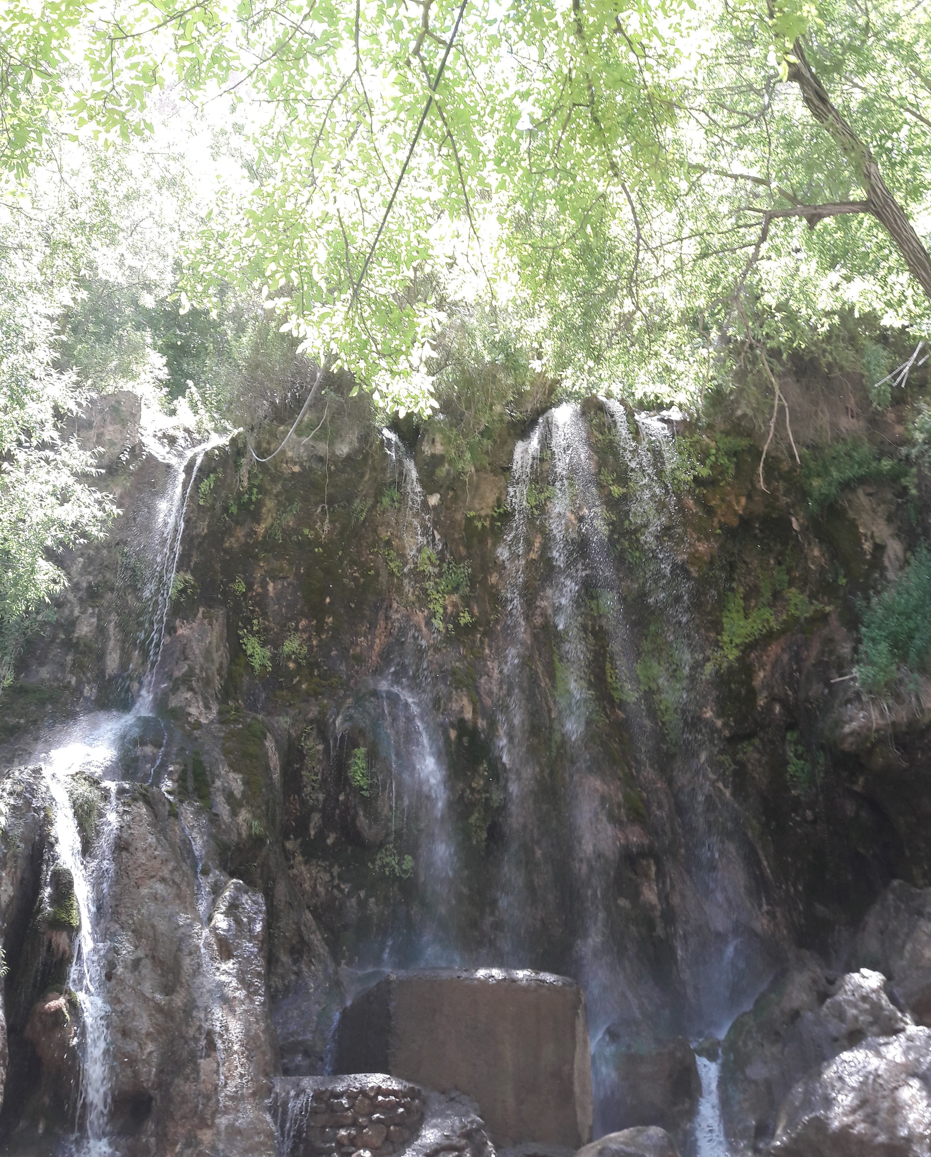 آبشار اخلمد چناران